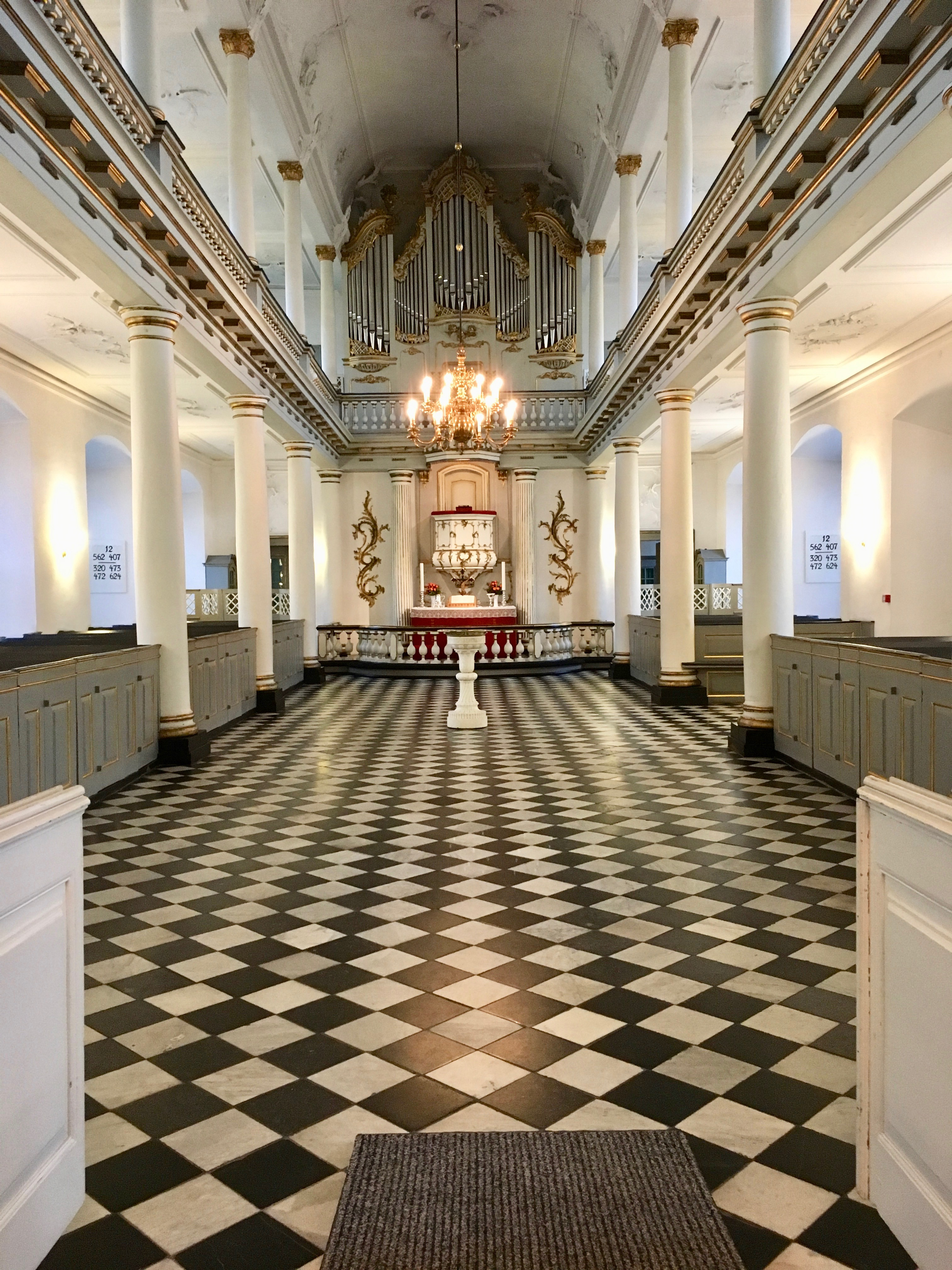 Augustenborg Slotskirke